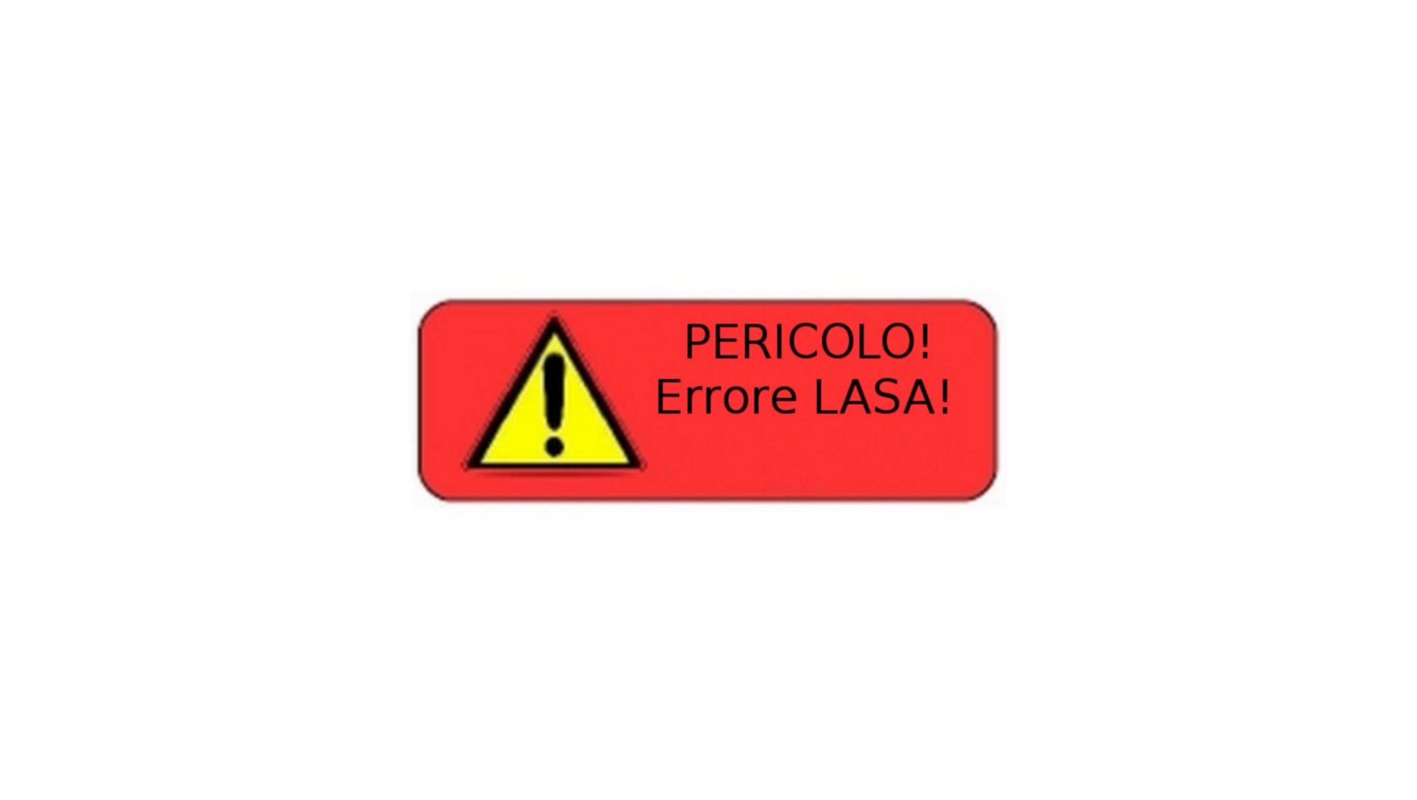 Etichetta Lasa da apporre su confezione